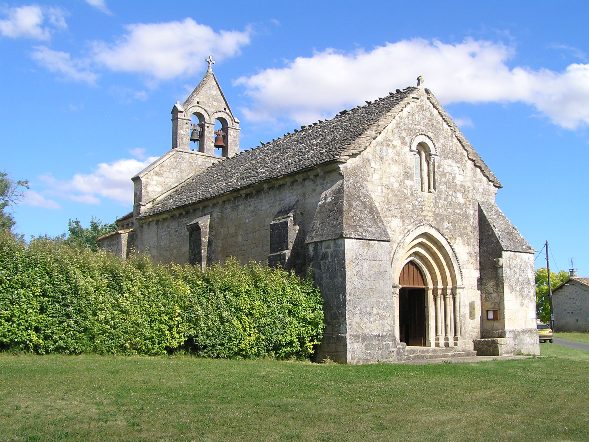 église de Theil-Rabier, Charente, France